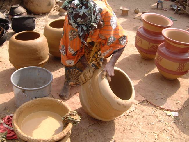 Photo d'une potière au travail. prise par Nerijp